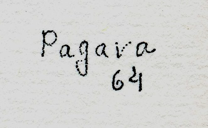 Signature du peintre Véra Pagava. Scan d'après catalogue.